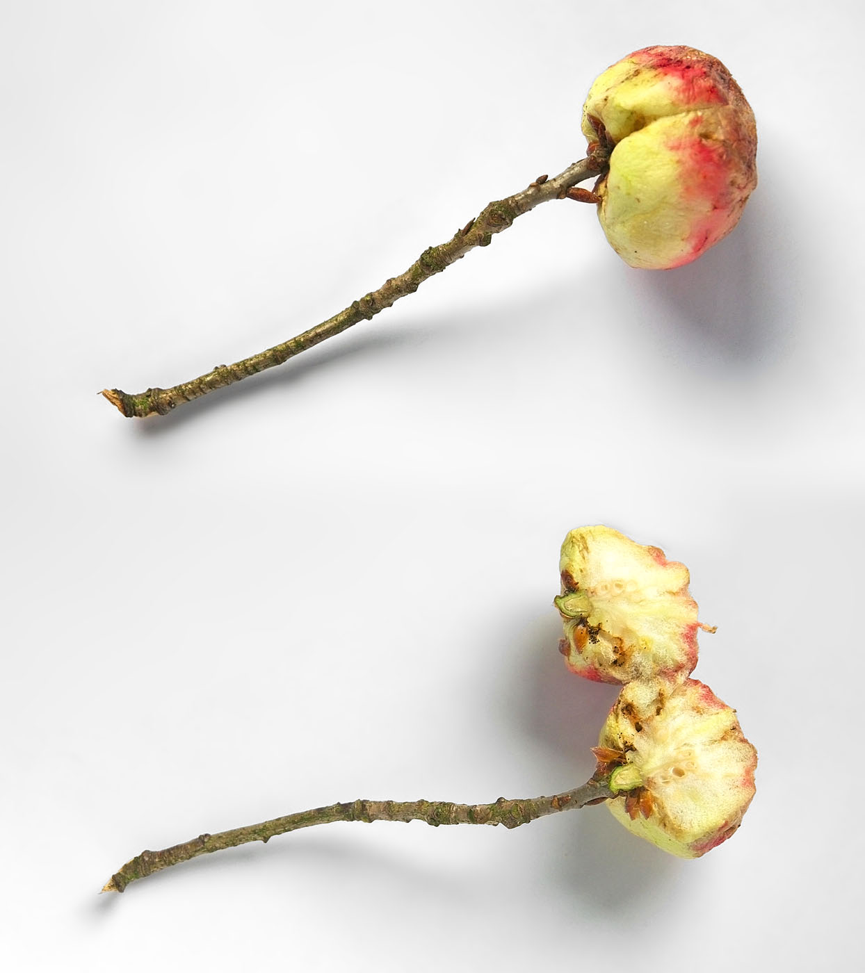 Gallapfel an Stängel mit Schnitt